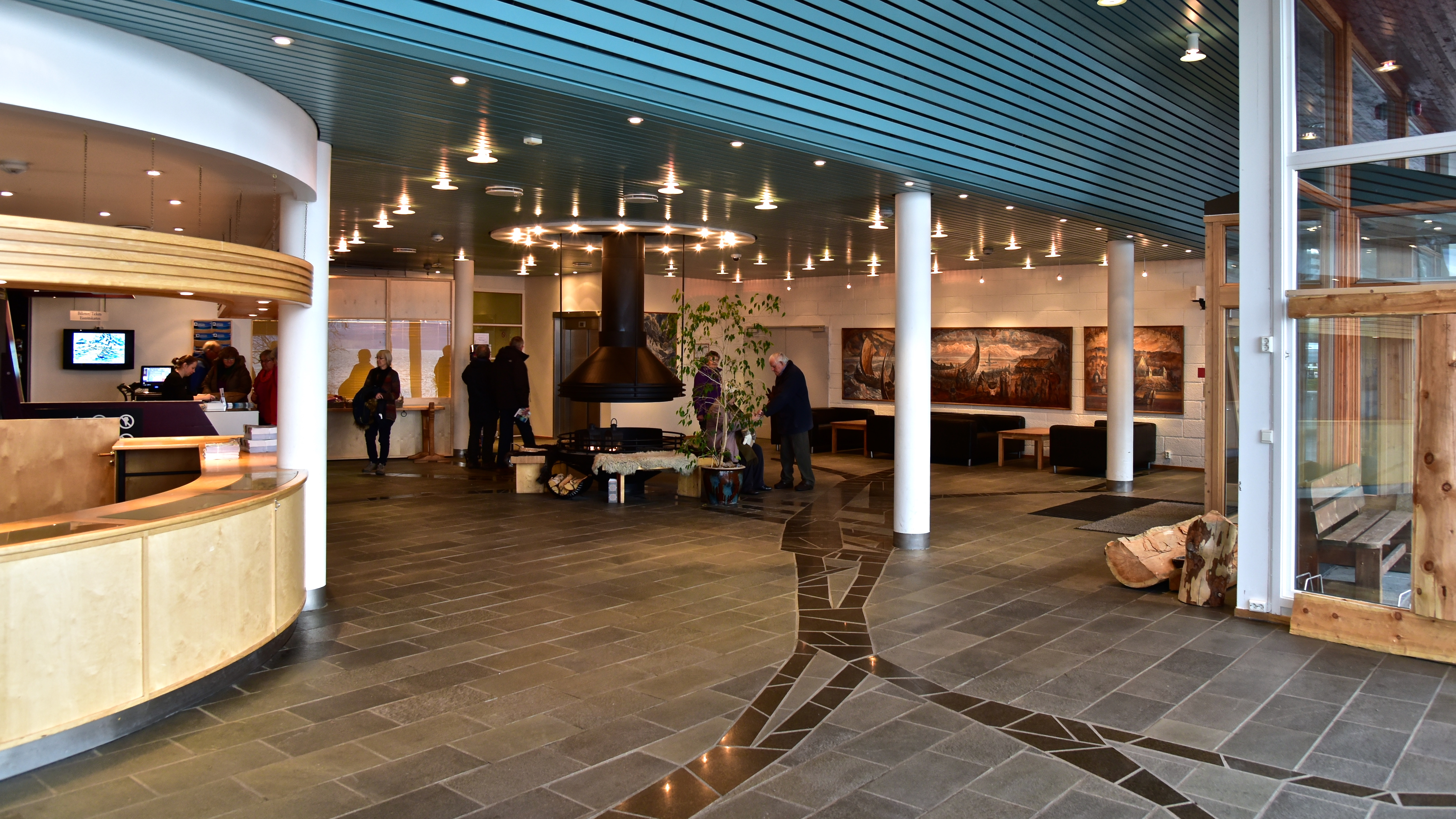 Hurtigruten Ferry / Cruise